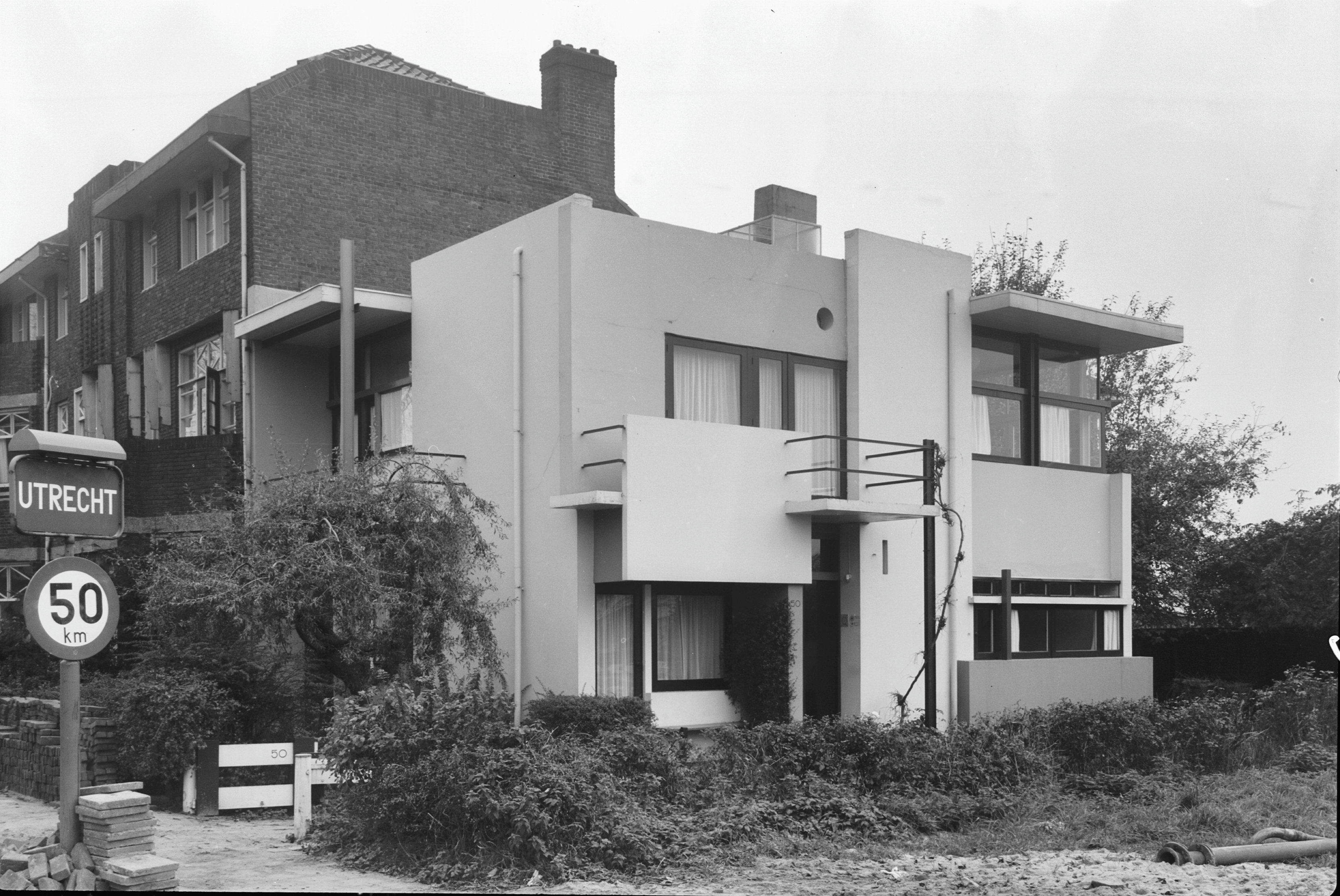 Rietveld-Schröderhuis: zuid-oost zijde